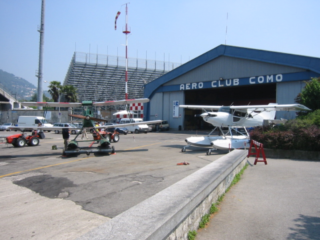 Aeroclub de Côme - Lac de Côme - Italie